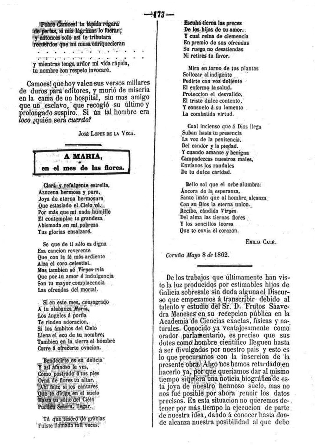 "A María en el mes de las flores"